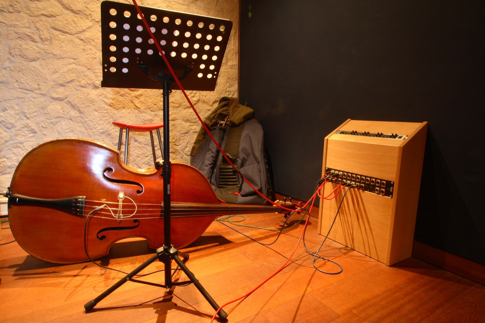 sae0014.JPG